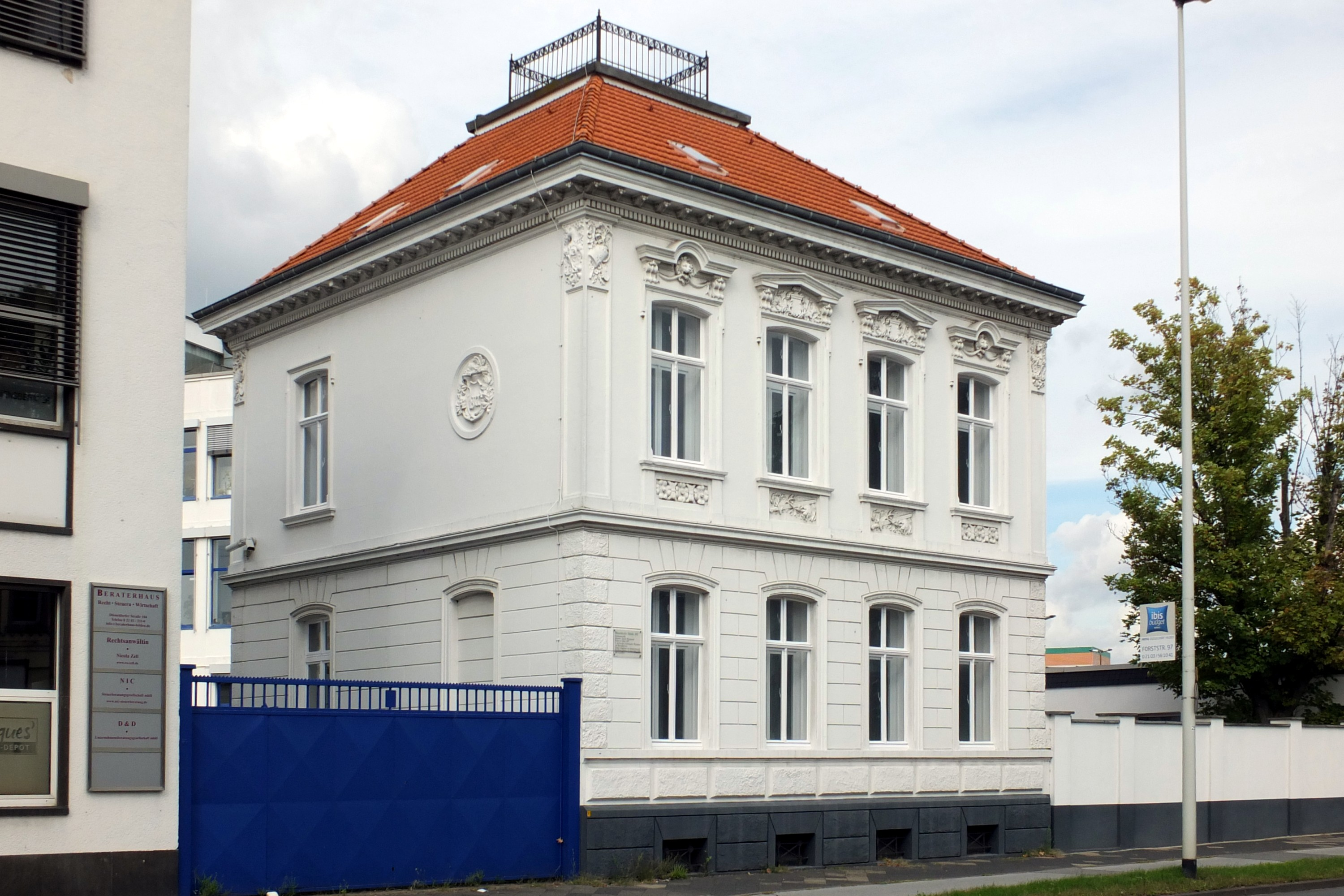 Fabrikantenvilla, Baujahr 1877, Hermann Wiederhold Lackfabriken, Hilden, Düsseldorfer Str. 102This is a photograph of an architectural monument.